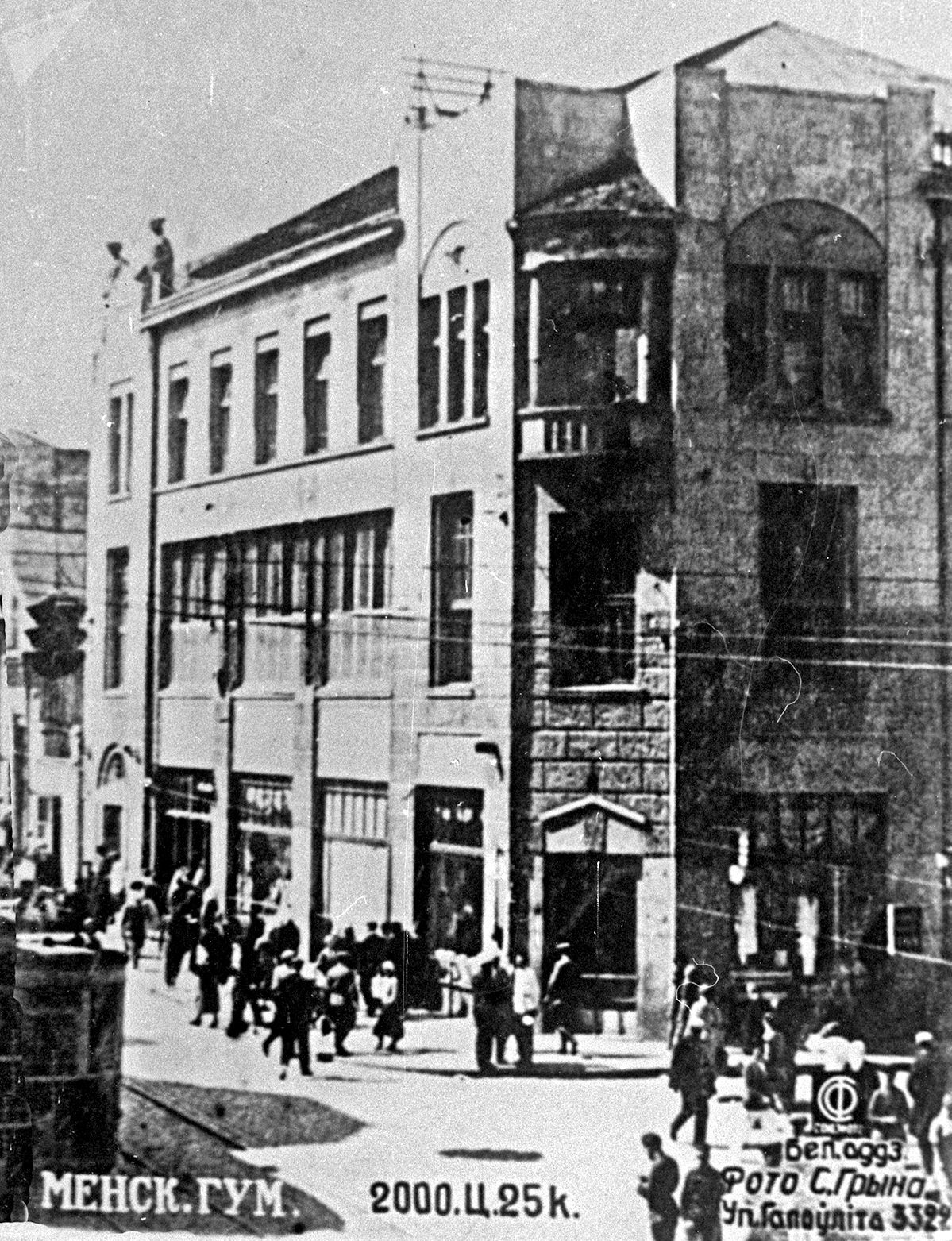 Беларуская (тарашкевіца): Менск (Miensk), вуліца Захараўская (vulica Zacharaŭskaja) каля скрыжаваньня з Фэліцыянаўскай (vulica Felicyjanaŭskaja). Будынак Таварыства ўзаемнага крэдыту, перароблены пад ГУМ